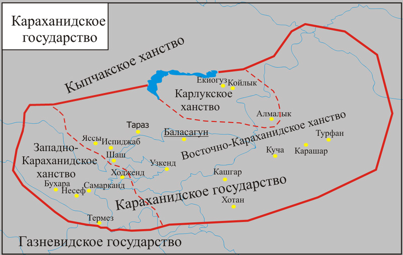 Государство Караханидов